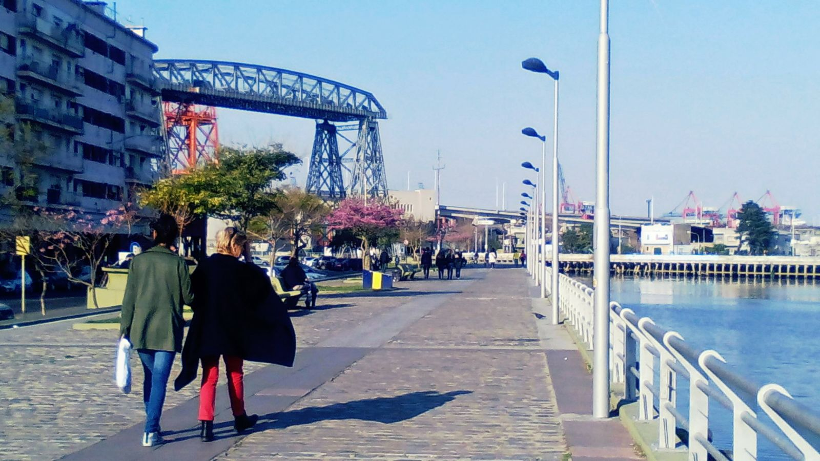 Ribera del Riachuelo La vecindad del Riachuelo es uno de los sectores de la ciudad Autónoma de Buenos Aires más visitados por los turistas por estar muy vinculado a la mitología del tango, danza típica del lugar. La vuelta de Rocha, donde el Riachuelo hace una amplia curva, es uno de sus lugares más característicos. Allí se encuentra Caminito, una callecita inmortalizada por el tango del mismo nombre, de Juan de Dios Filiberto. La Ribera fue convertida en un paseo y una obra de ingeniería hidráulica ha conjurado la maldición de las inundaciones.